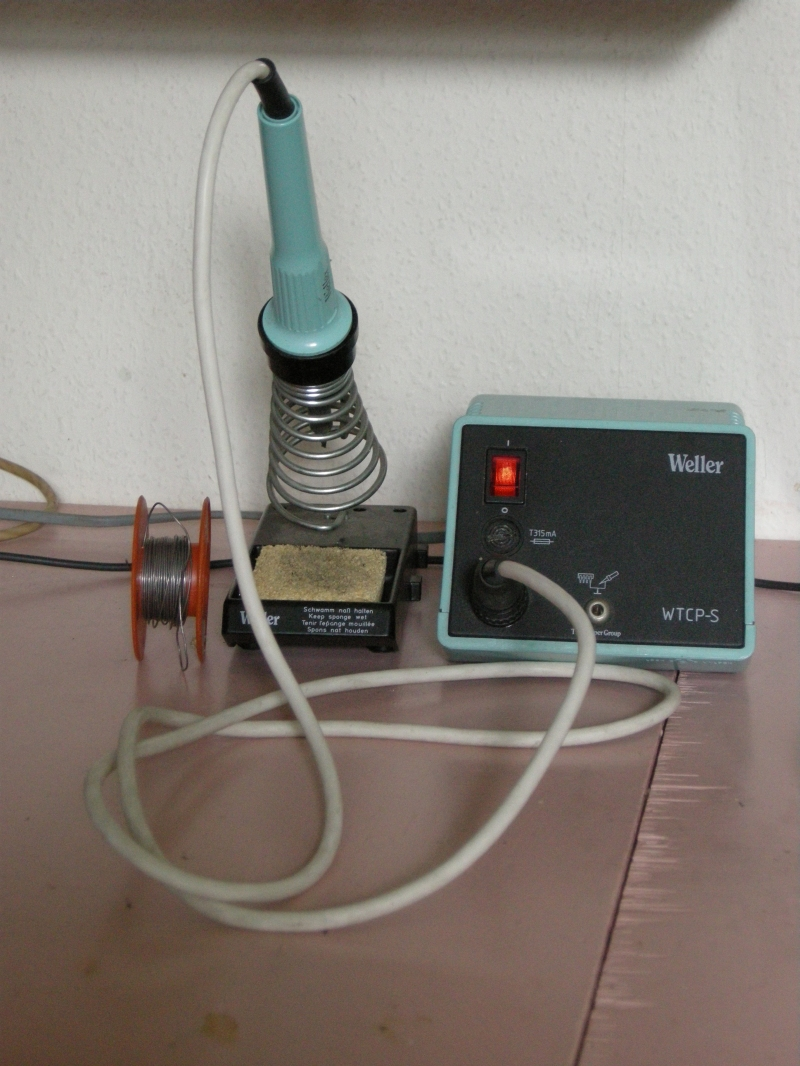 Een befaamd soldeerstation van Weller